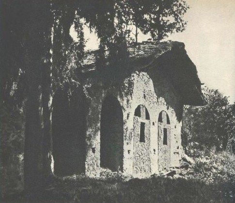 Assama Kedus Mikael in Fasil Ghebbi